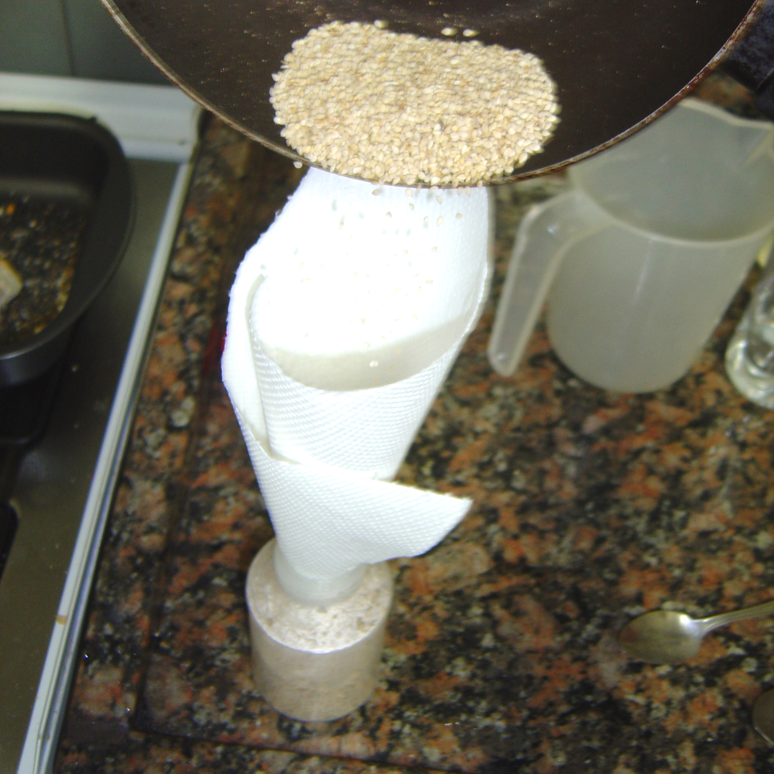 Exemplo de gambiarra: Funil improvisado com guardanapo. Foto: Rodrigo Boufleur, São Paulo, SP, 2006 An exemple of "gambiarra" (improvised solution). A Funnel made with a napkin. Foto: Rodrigo Boufleur, São Paulo, Brazil, 2006